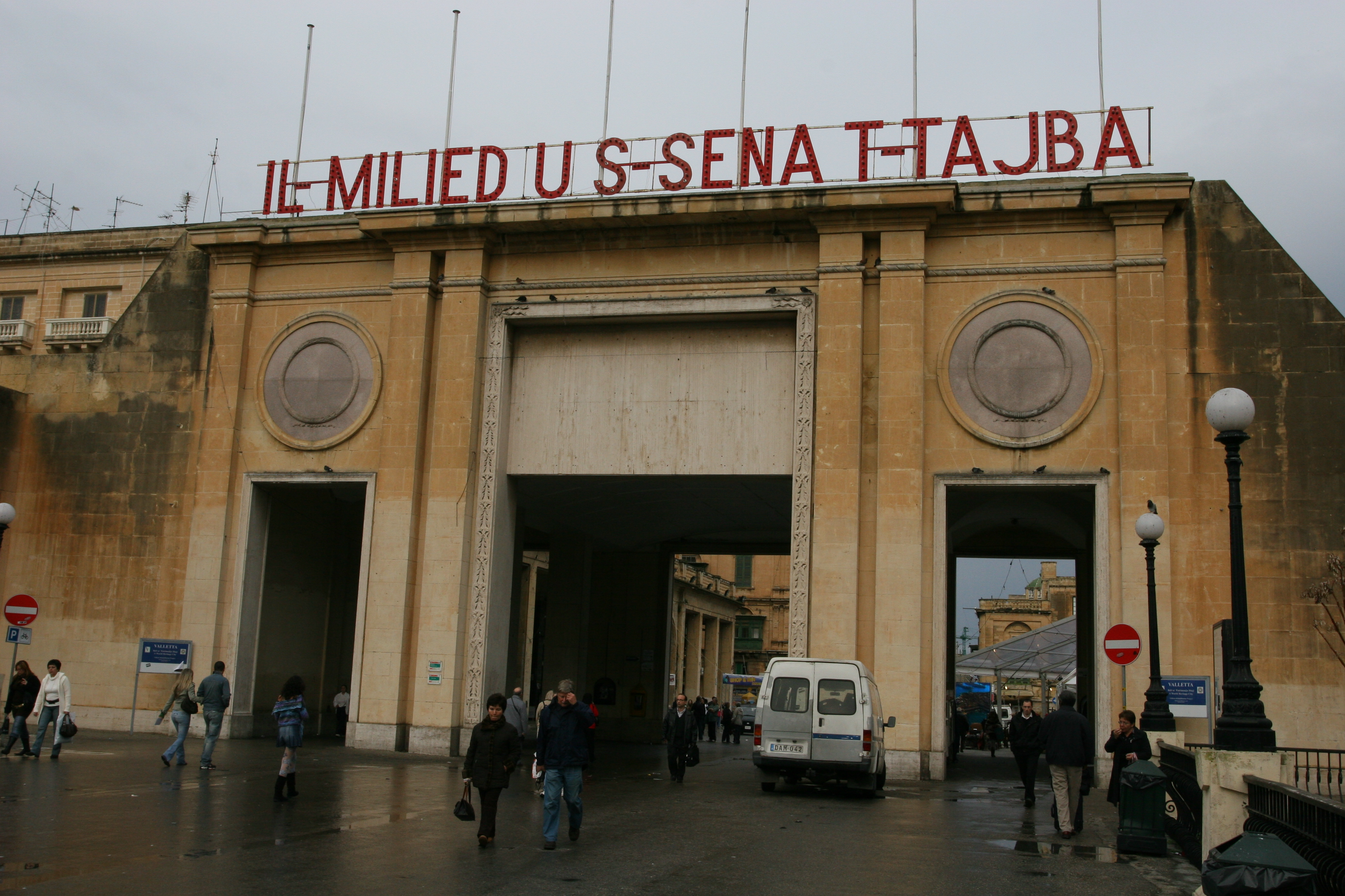 Valletta City Gate